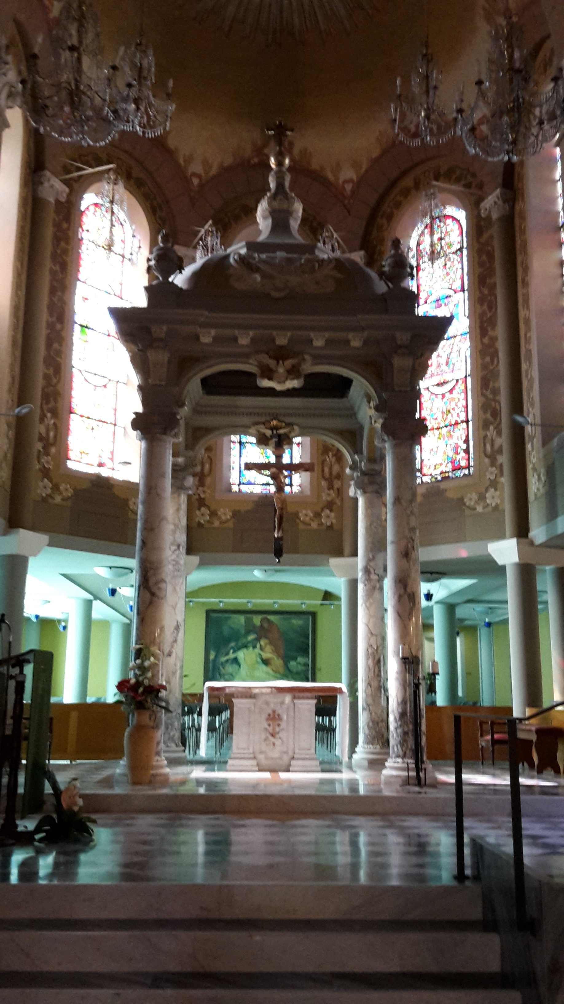 Immagine della chiesa dell'Immacolata Concezione a Bordighera, altare